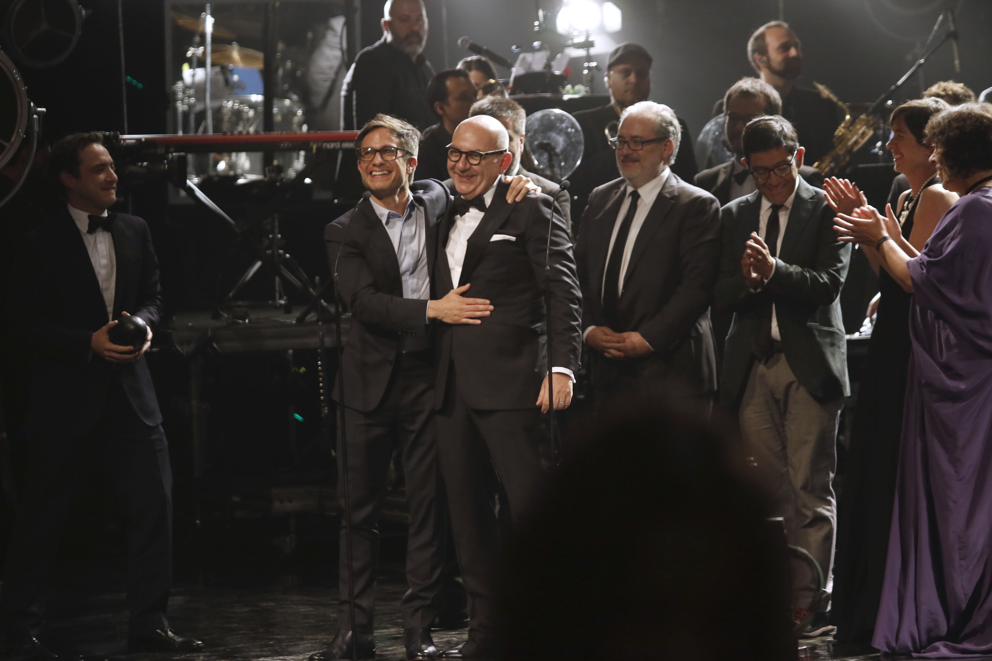 Miércoles 7 de diciembre de 2016.En el Teatro de la Ciudad Esperanza Iris, se realizó la entrega del Tercer Premio Iberoamericano de Cinematografía, Fenix 2016. Ganadores:Mejor Película de ficción: Neruda Fotografía: Milton Martínez / Secretaría de Cultura CDMX